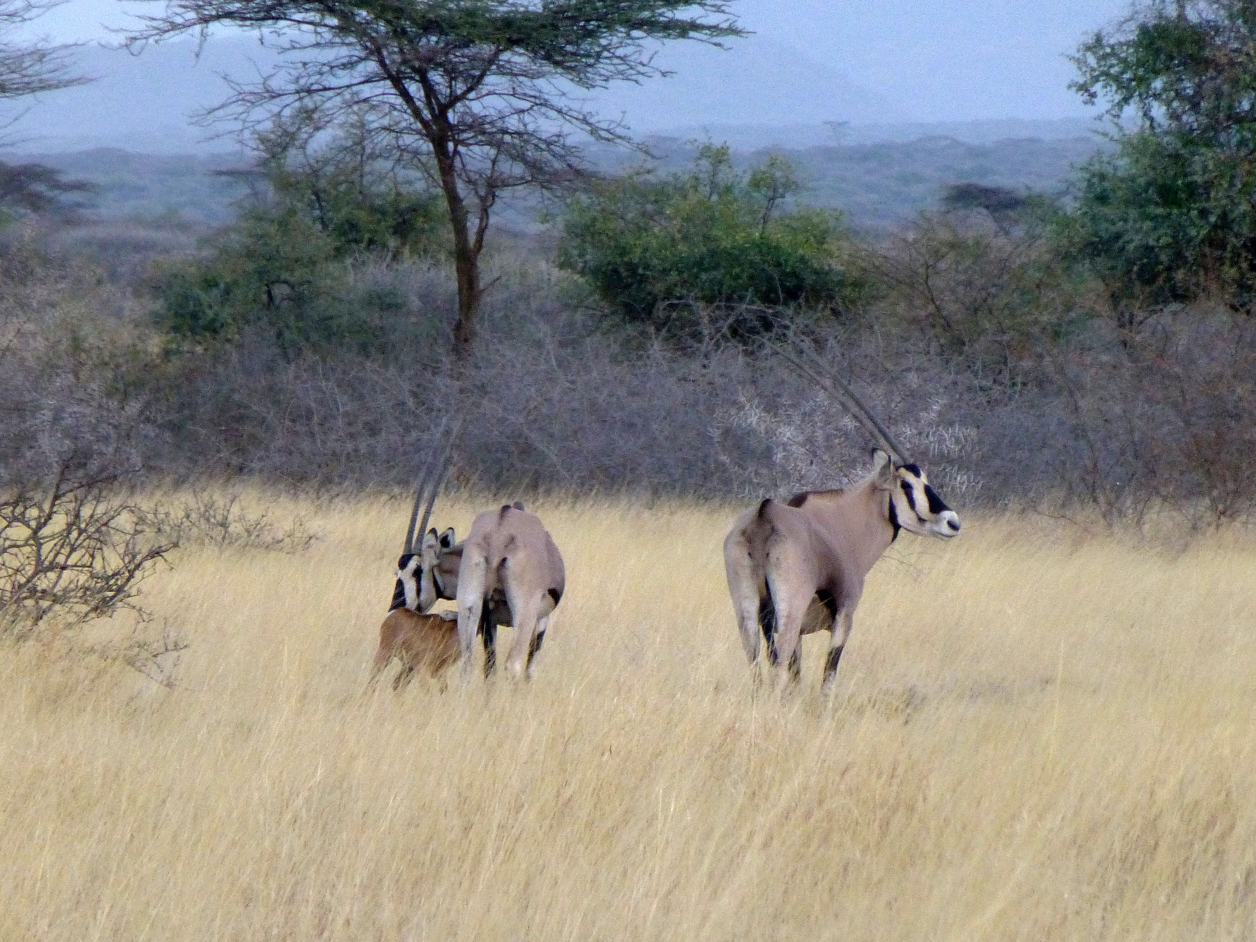 Oryx beisa dans le Parc national d'Awash (Ethiopie)